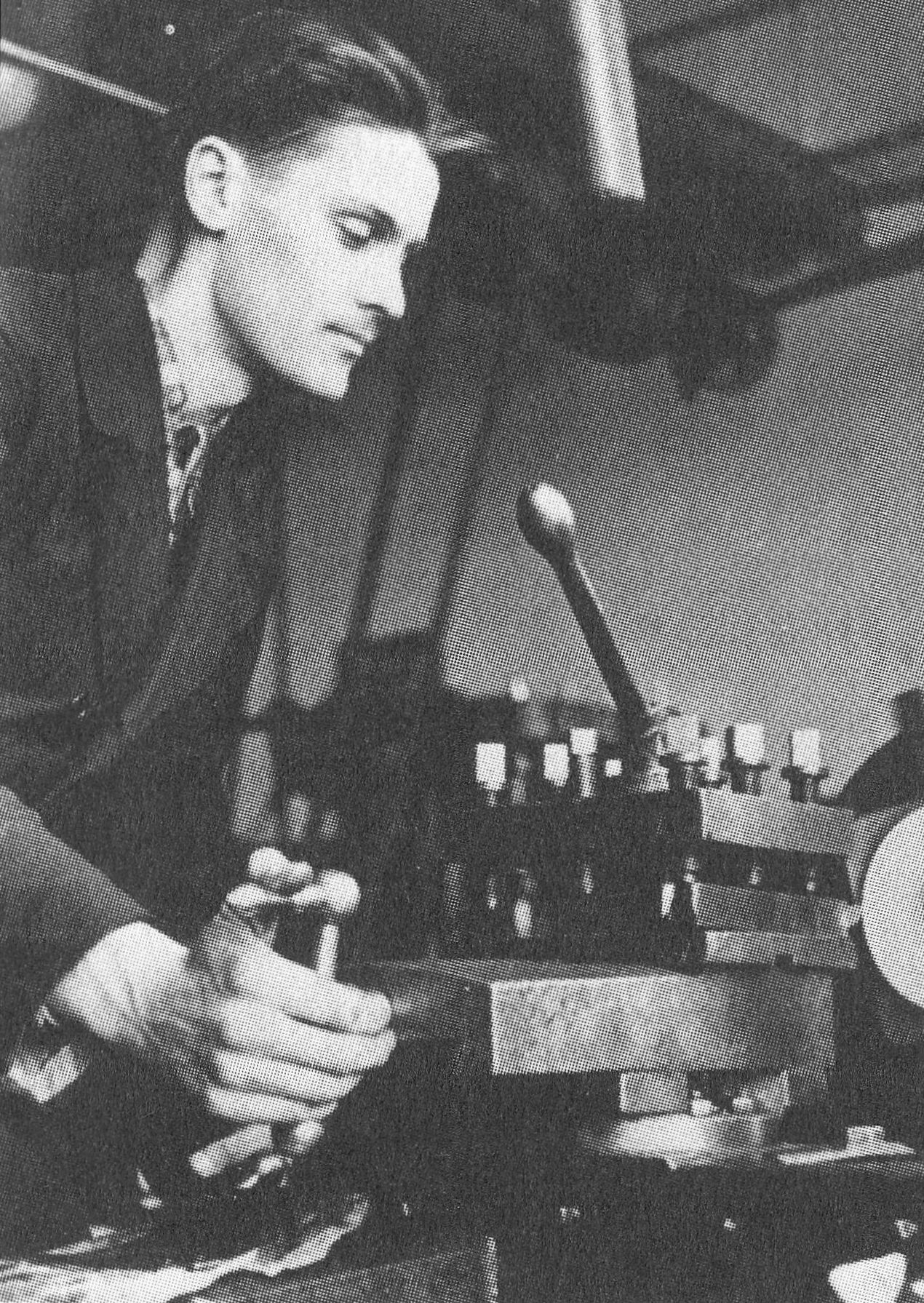 Maciej Aleksy Dawidowski podczas zajęć w Szkole Wawelberga i Rotwanda